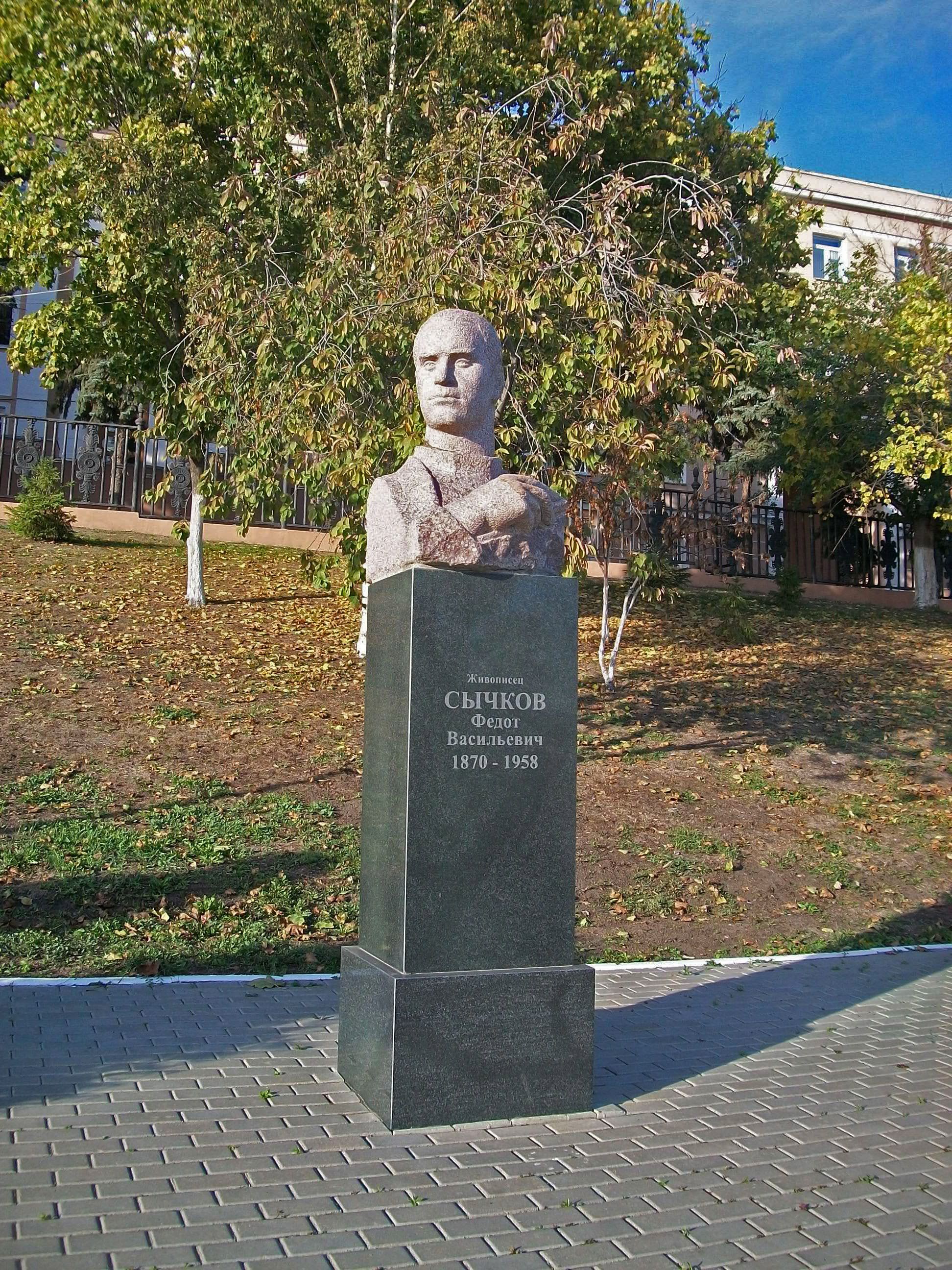 Бюст художника Федота Васильевича Сычкова, установленный в мемориально-скульптурном комплексе в Саранске